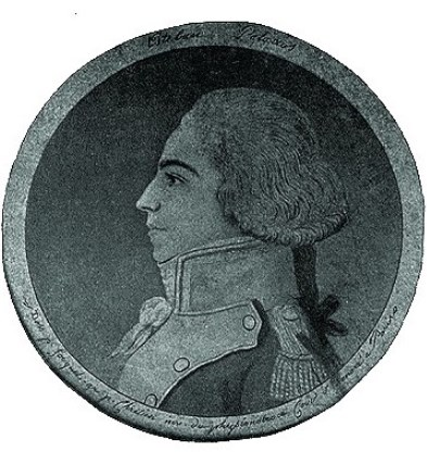 Dibujo de Esteban Palacios y Blanco realizado en Madrid en 1808